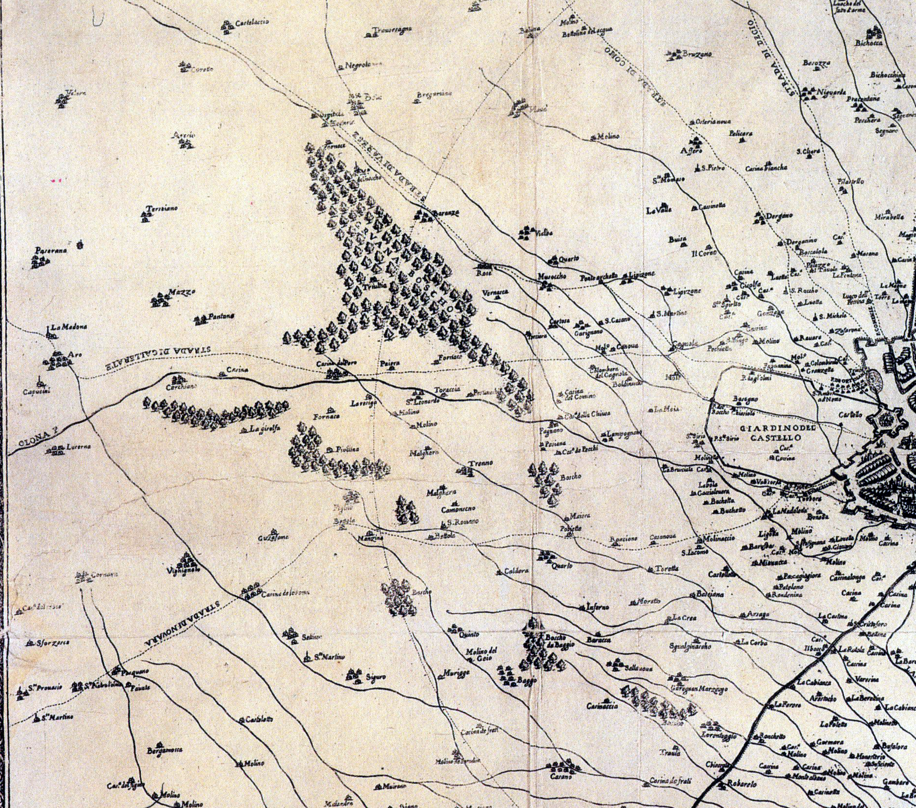 Mappa di Giovanni Battista Clarici (eseguita 1600) di Milano e dintorni